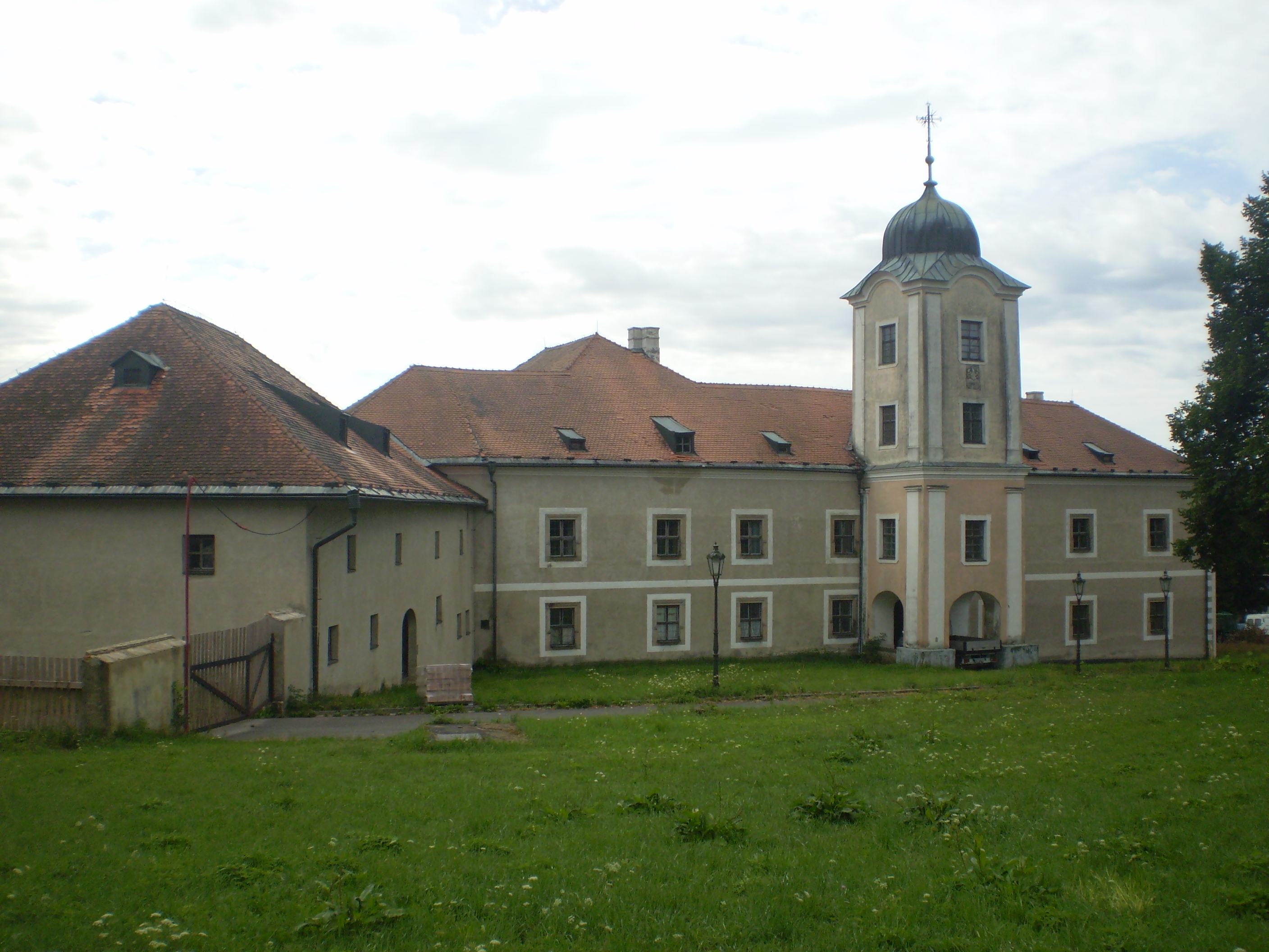 zámek v Rudolci